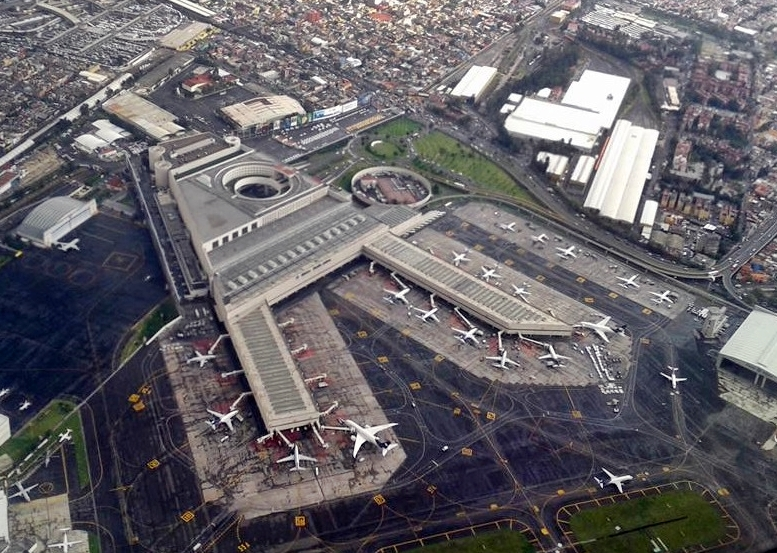 Vista aérea de la Terminal 2 del Aeropuerto Internacional de la Ciudad de México T2 CDMX.